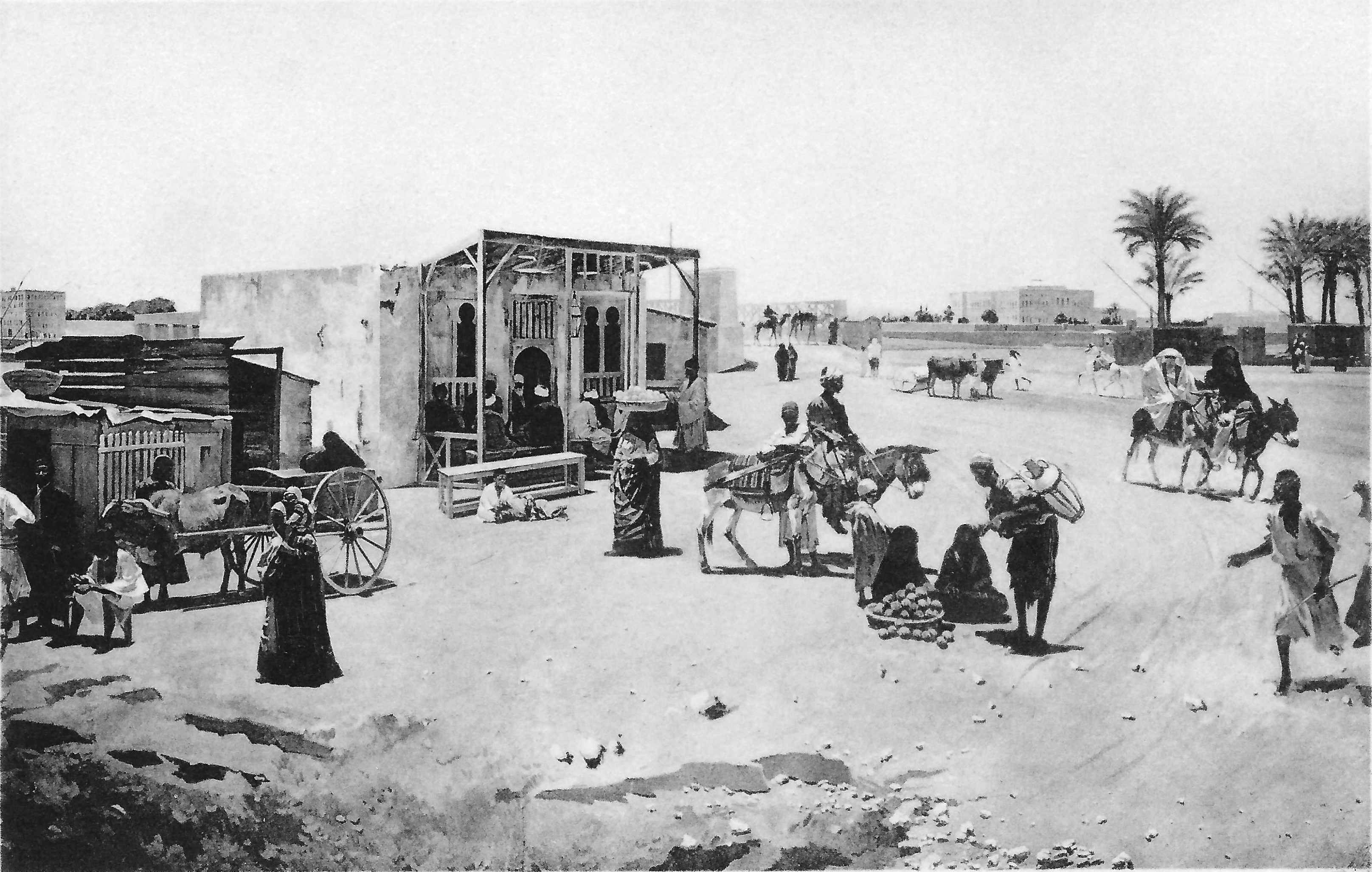 Dorpsbeeld van een dorp rond Cairo door Emille Wauters. Waarschijnlijk geschilderd vanuit een foto.